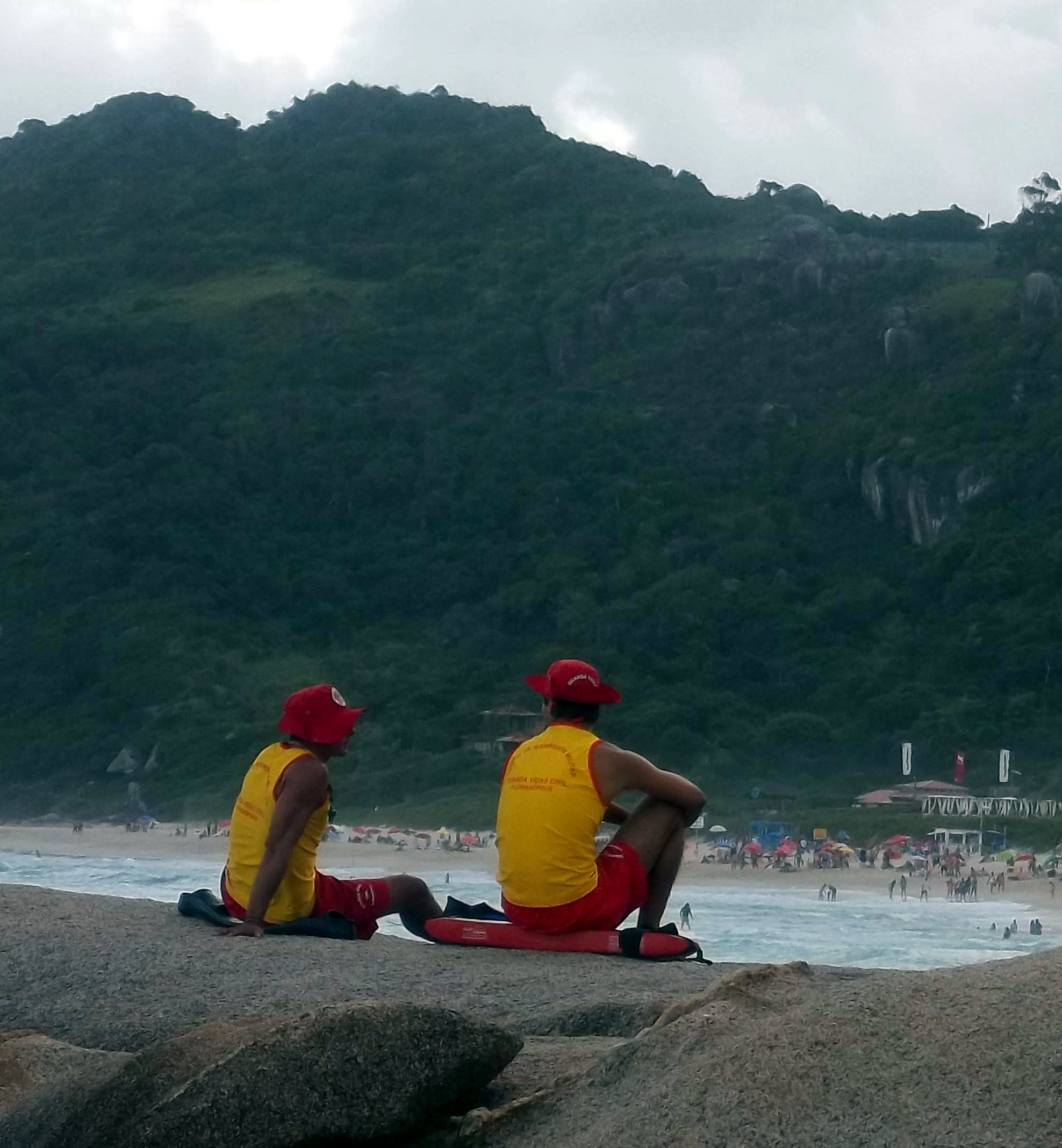 Praia Mole - Florianópolis - Brasil